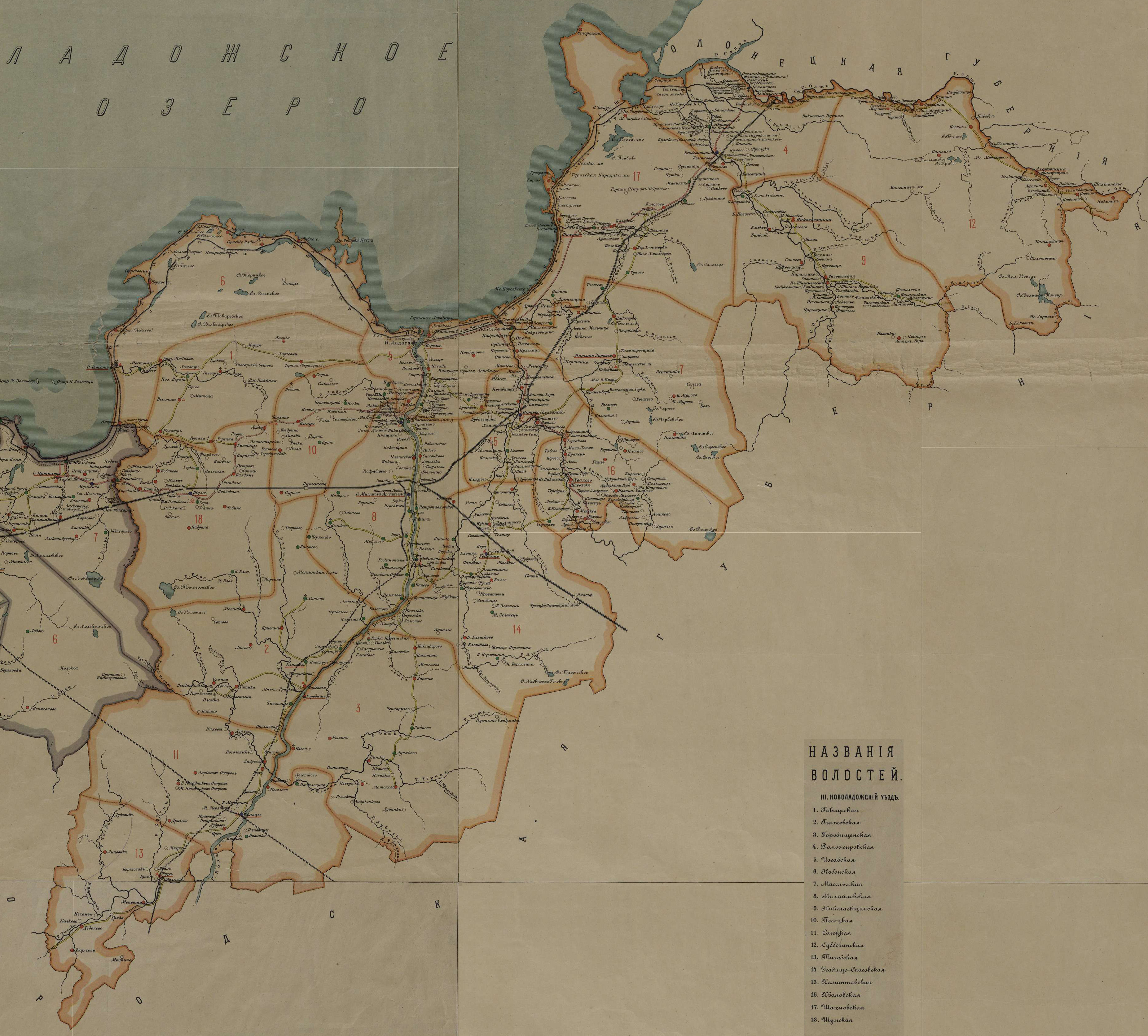 Новоладожский уезд с разделением на волости на карте Петроградской губернии 1916 года.